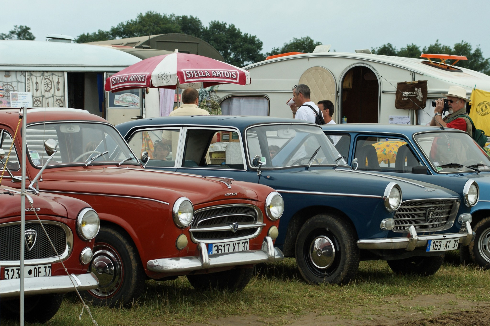 Peugeot 403 et 404 lors de la Locomotion en fête - 2009